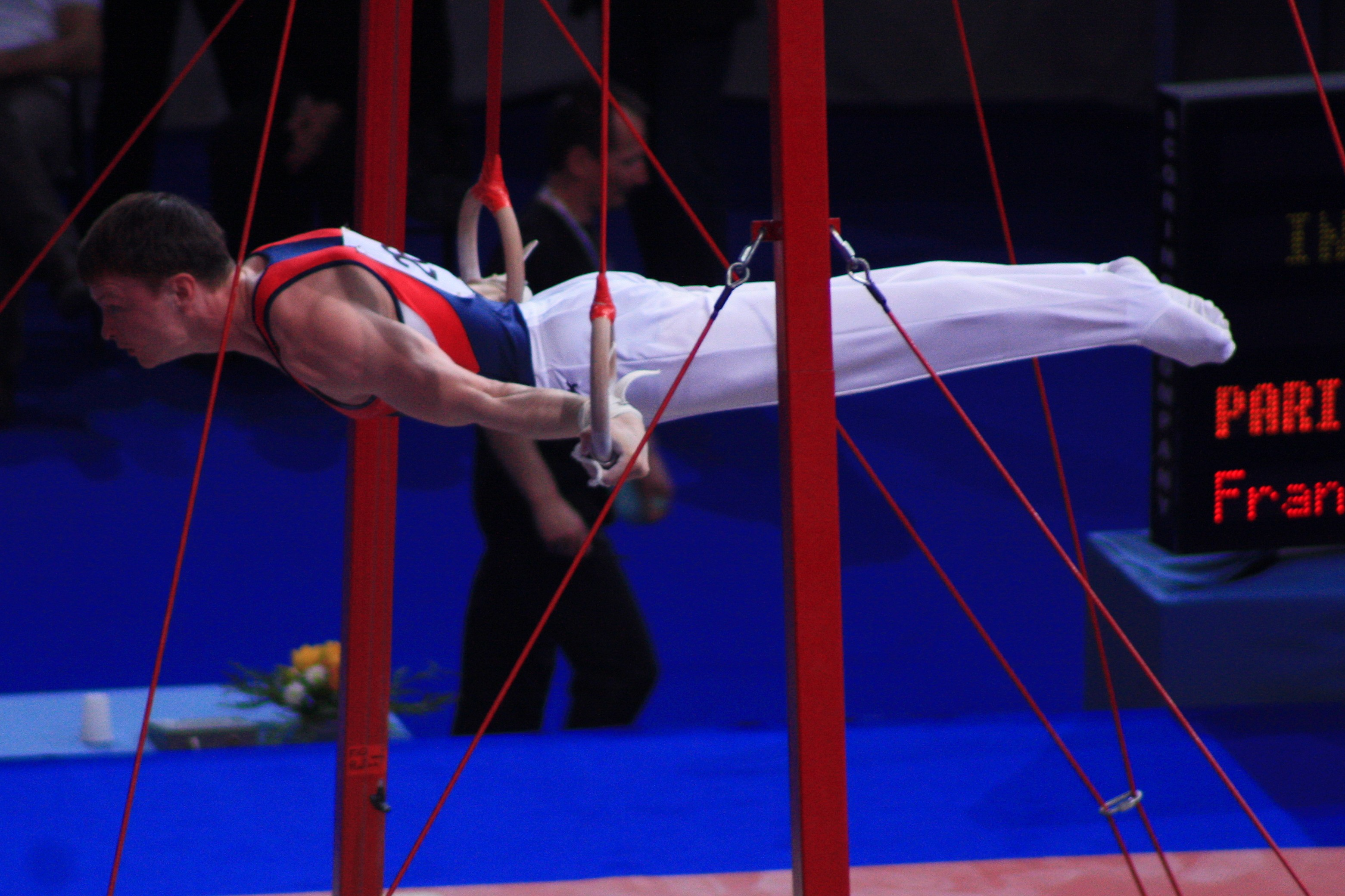 Anton Fokin lors des qualifications aux anneaux des 17e Internationaux de France en 2010.